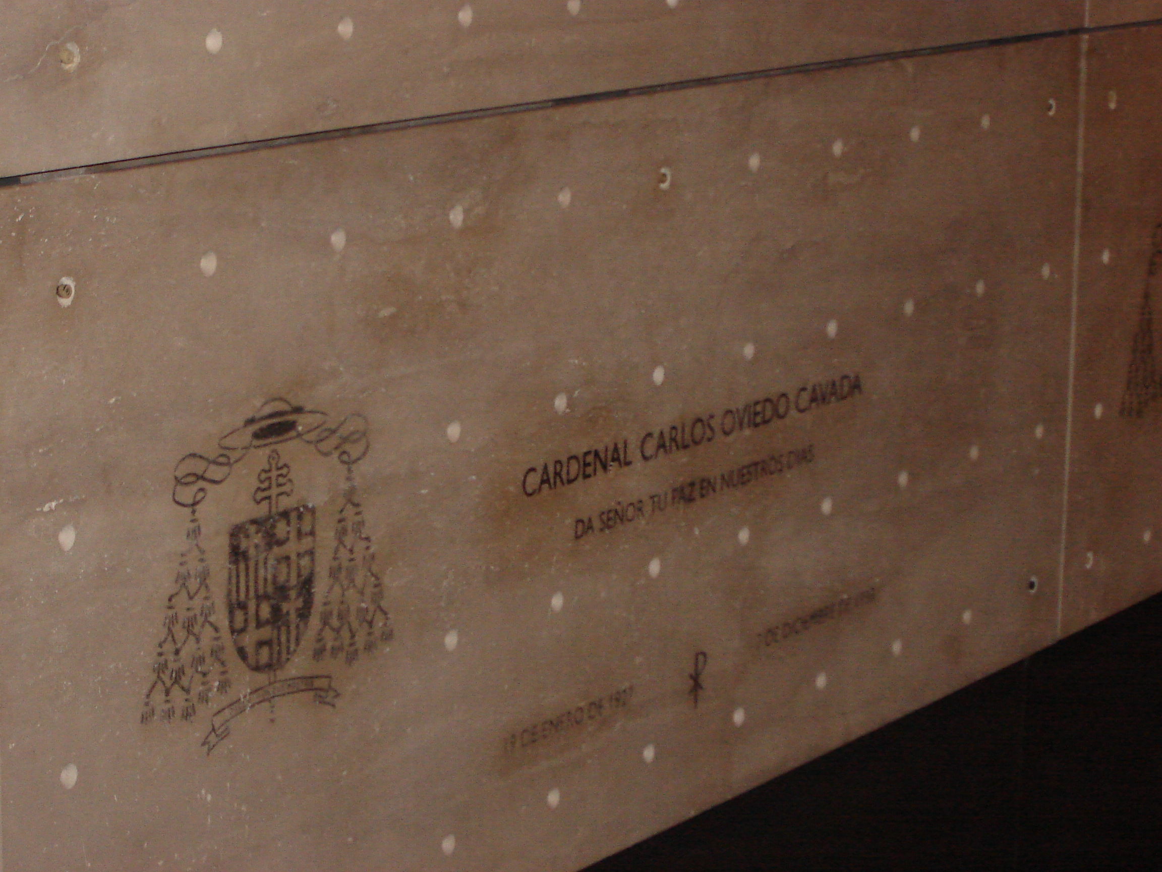 Esta foto fue captada por el Usuario Valo